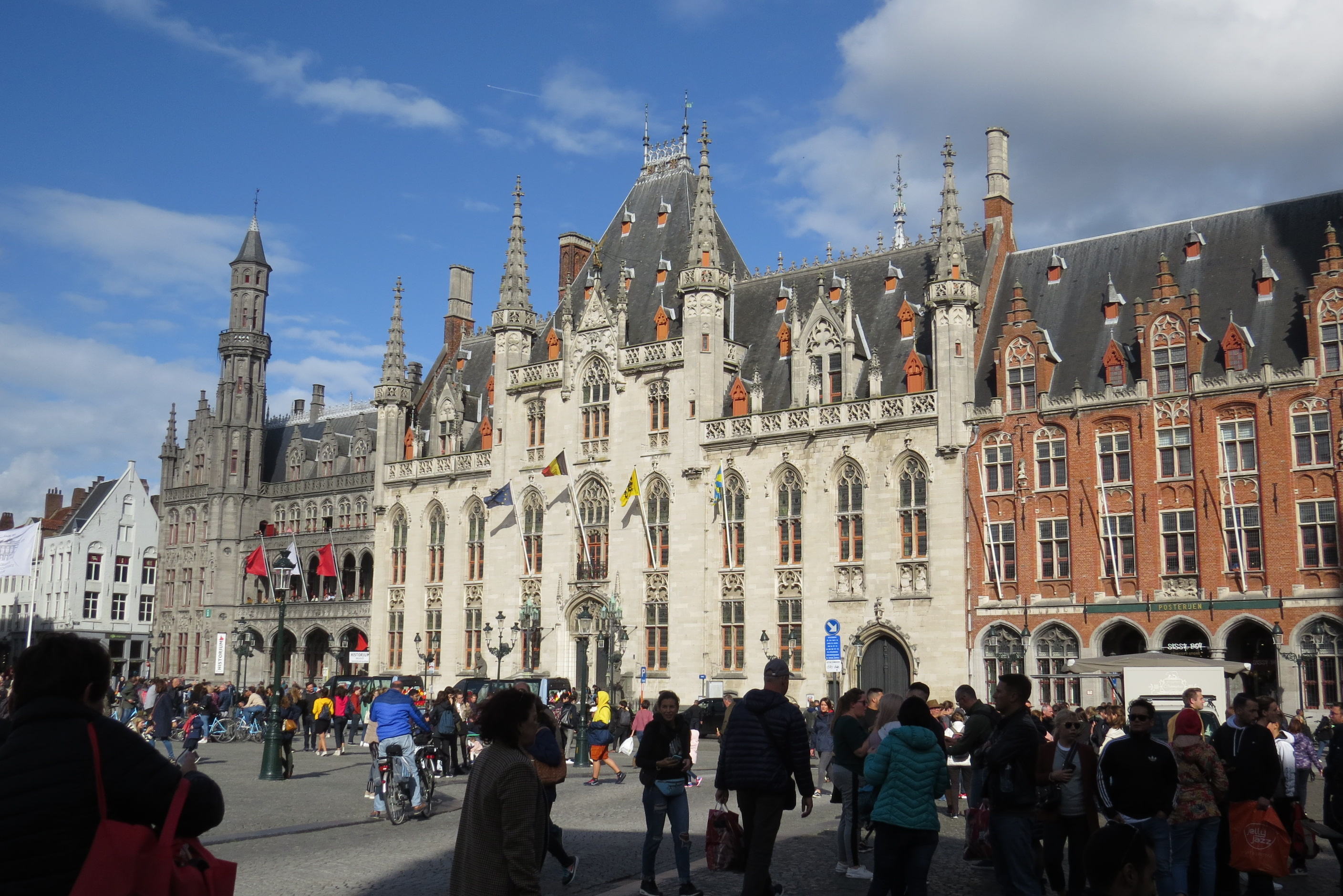 Brügge in Belgien, Ansichten vom Grote Markt